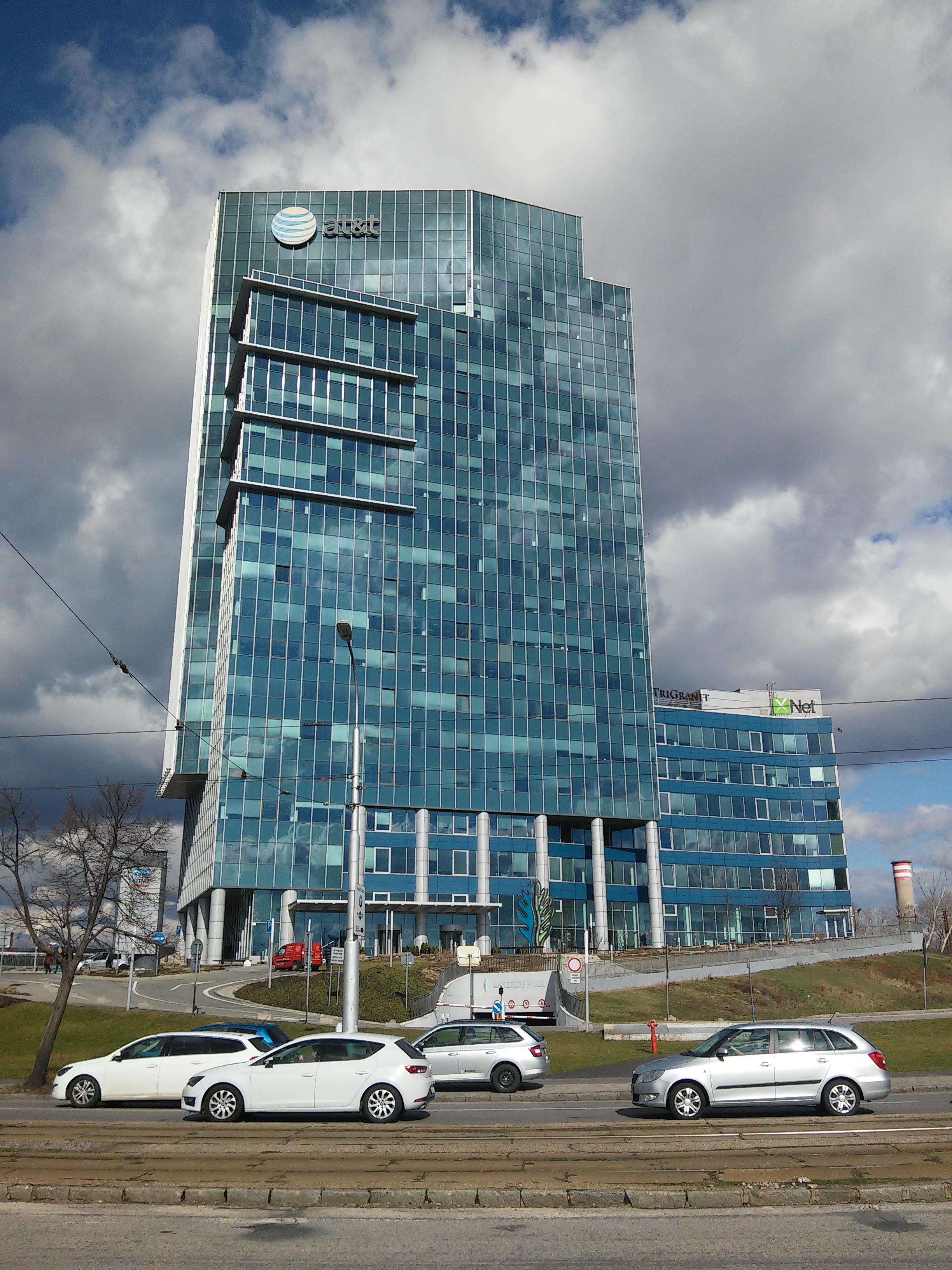 Lakeside Park, Bratislava